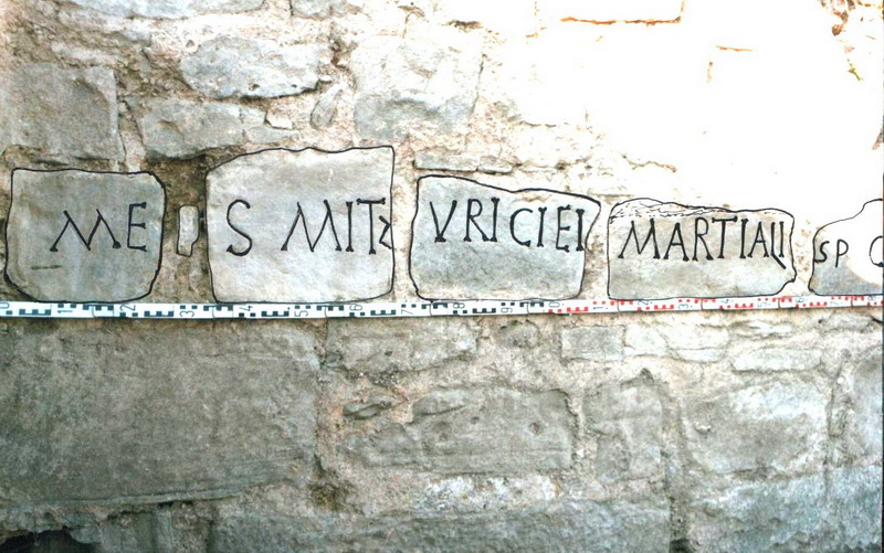 Къснолатински (неразчетен) надпис, разкрит от външната страна на северната крепостна стена: MESMITZVRICIEIMARTIALISPC